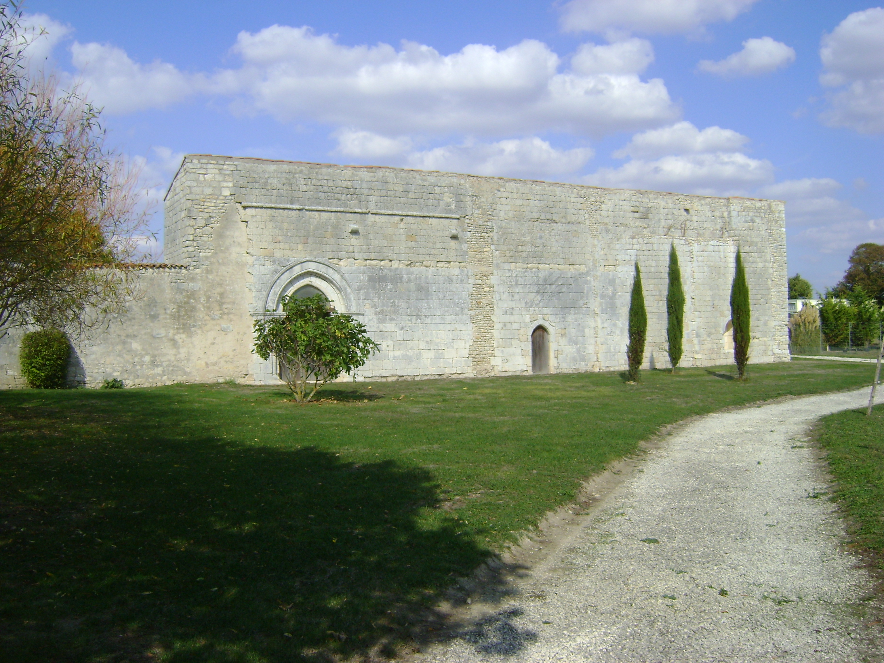 Ancien prieuré de Sermaize à Nieul-sur-Mer, Charente-Maritime. La façade sud et le portail d'entrée. .